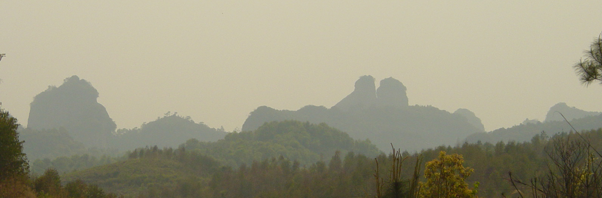 远眺韶石山 创作方法:自拍 拍摄人:zhuwq 拍摄时间及地点:2005年4月2日拍摄于仁化县周田镇龙坑管理区